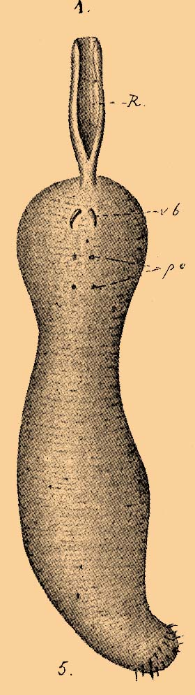 Иллюстрация к статье Эхиуровые из энциклопедии Брокгауза и Ефрона